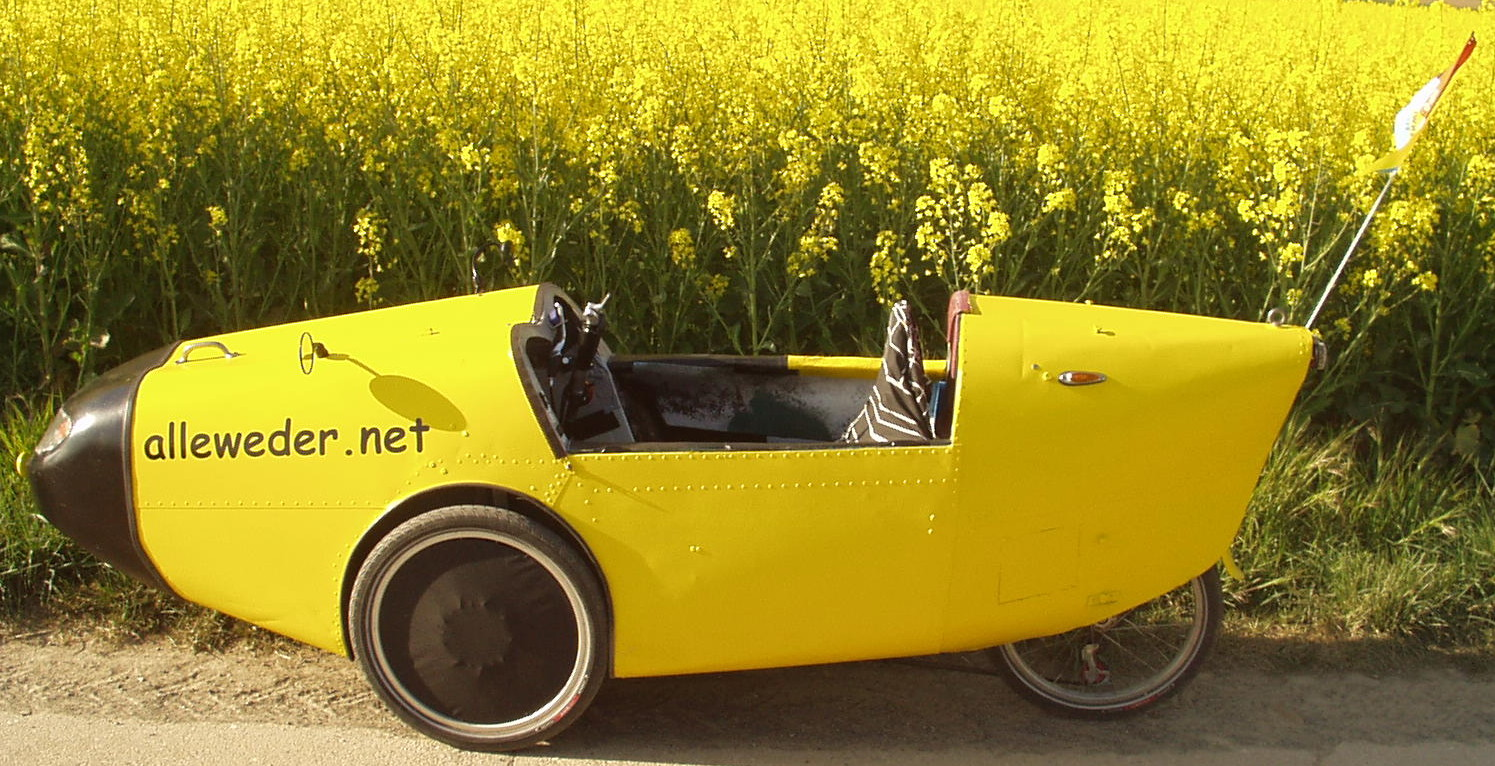 Flevo Alleweder